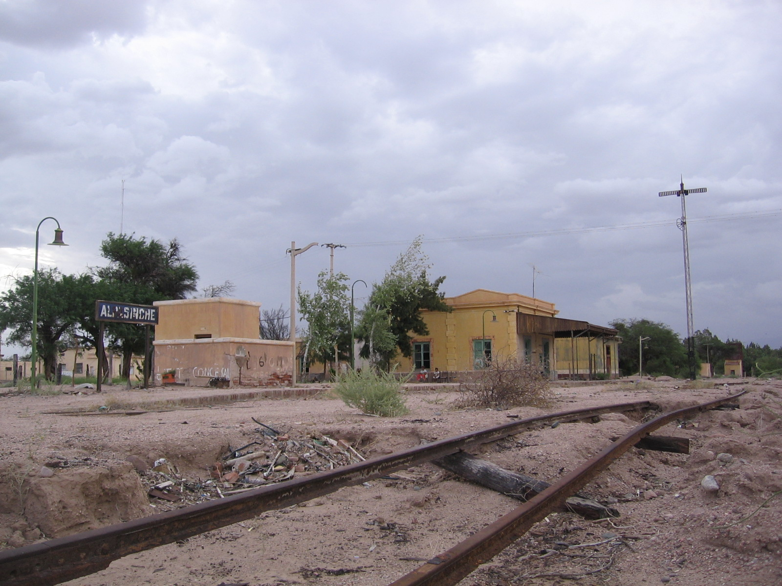 Estación Alpasinche. Perteneciente al abandonado ramal A5 del ex-Ferrocarril Belgrano. La Rioja. Argentina. Foto tomada el 13 de Enero de 2006.